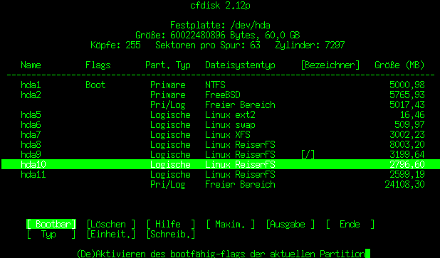 screenshot von cfdisk